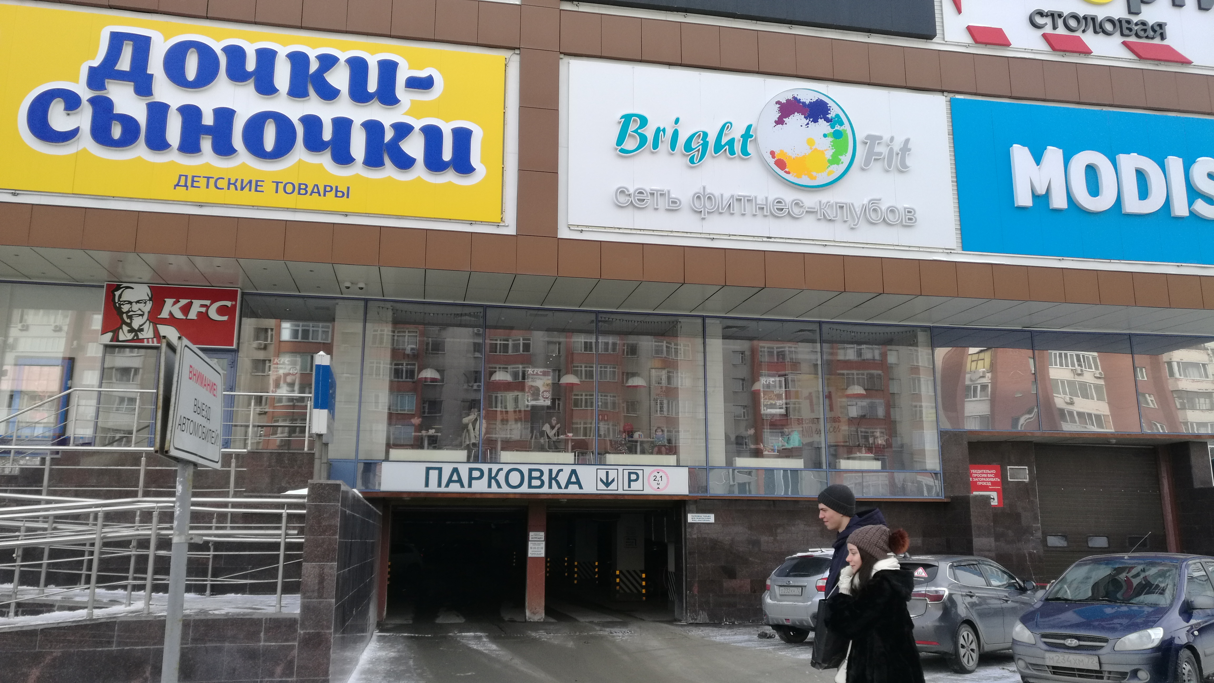 La aĉetcentro Magellan. Tjumeno, Rusio.